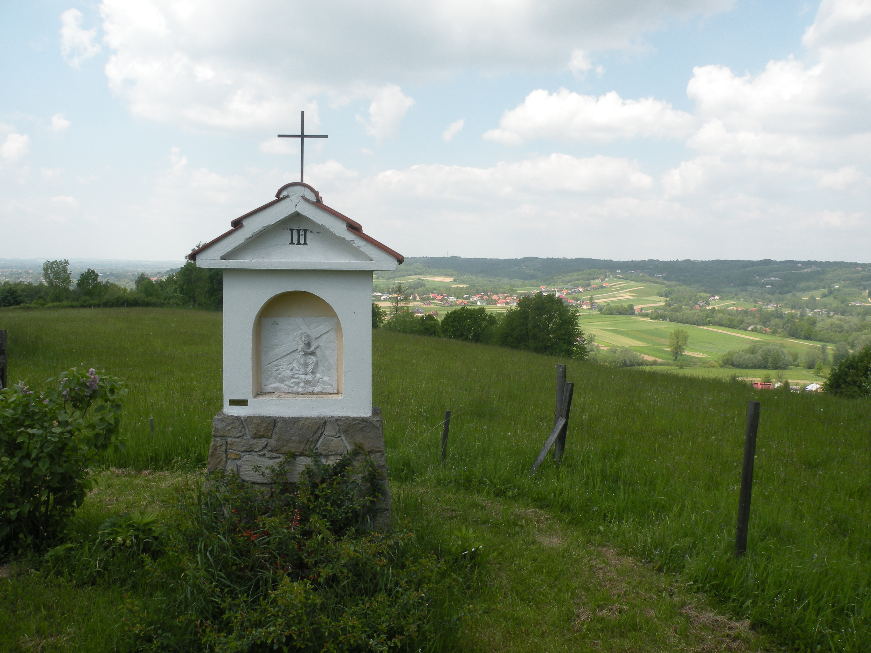 Kapliczka na Drodze Krzyżowej przy Kościele OO. Dominikanów w Borku Starym